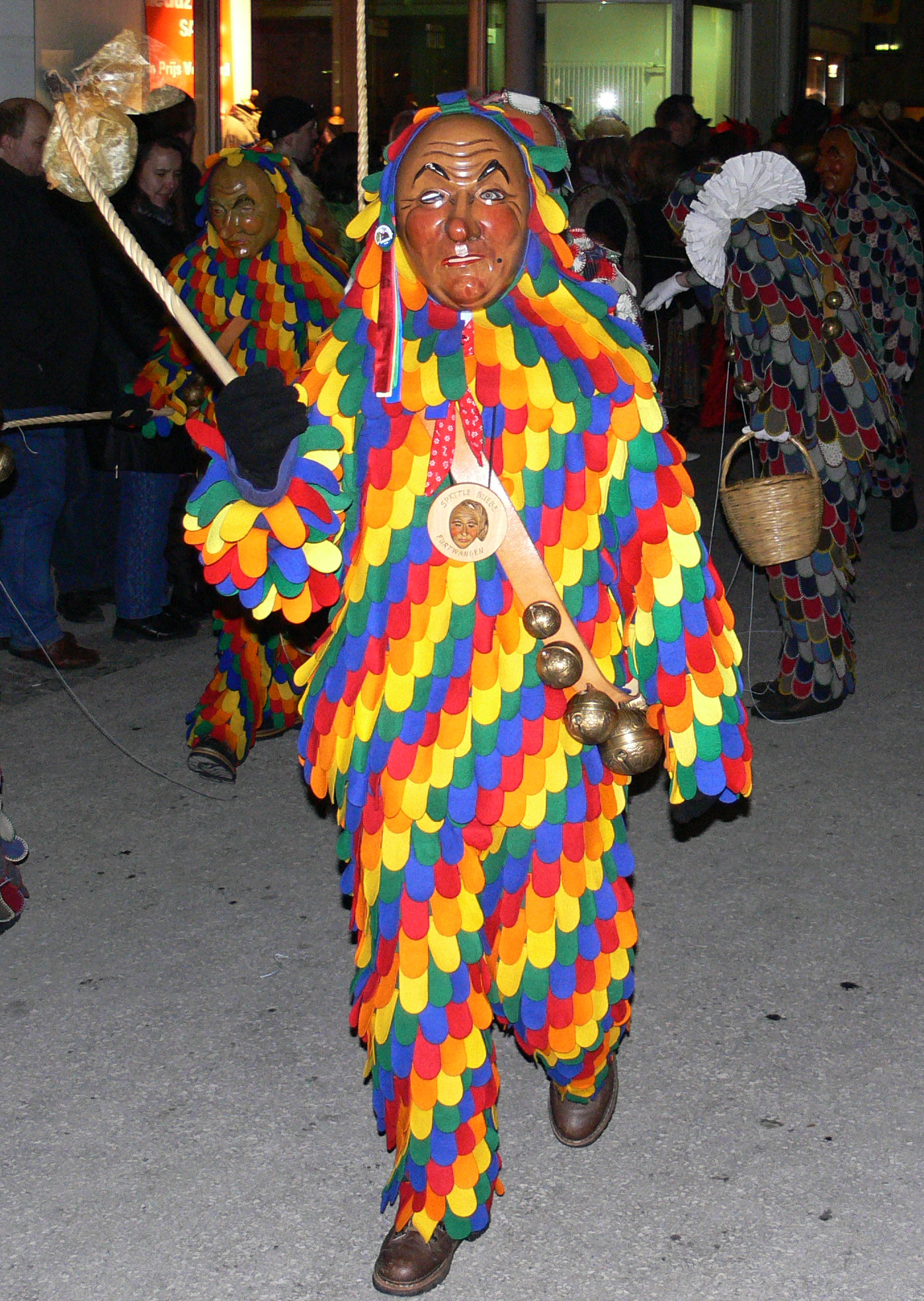 Narrenzunft Furtwangen, Figur: Spättle Veranstaltung: VSAN-Landschaftstreffen 2006 in Weingarten, Flecklesumzug